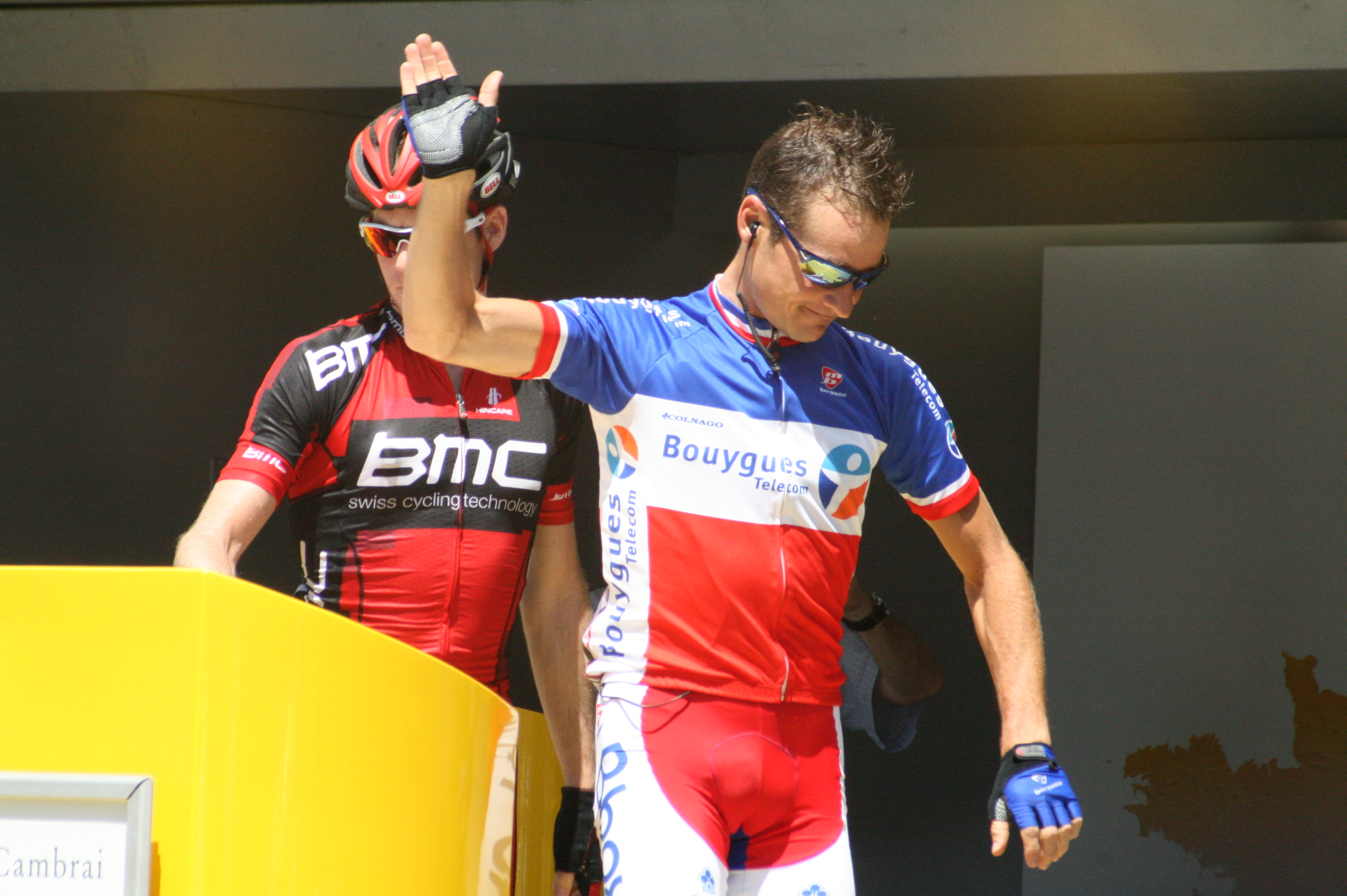 Départ de la 4e étape du Tour de France à Cambrai - Thomas Voeckler